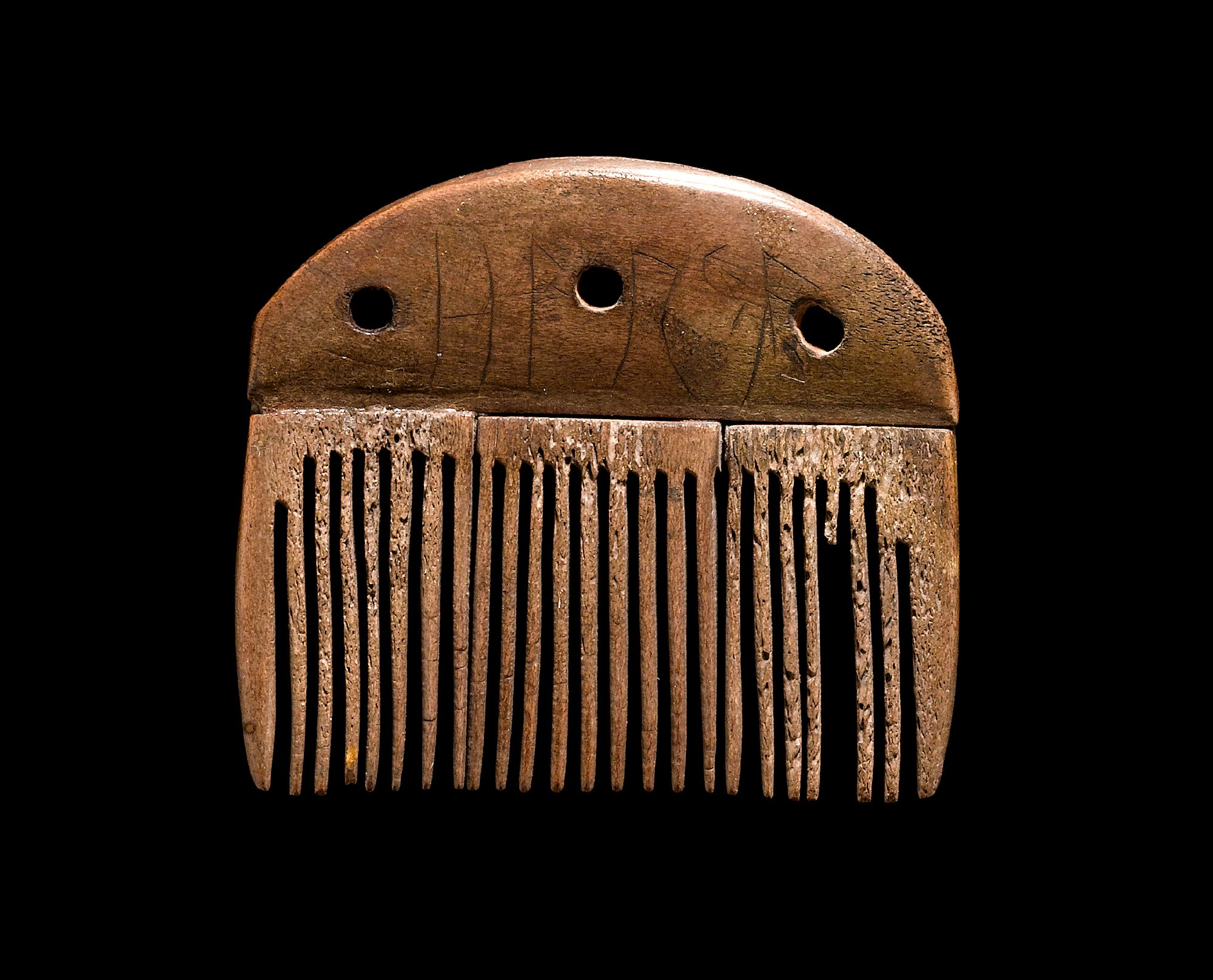 Kam af tak med runer HARJA. Fra Vimose, Næsbyhoved-Broby sogn.